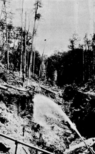 Imagen en Chile descripción física, política, social industrial y comercial de la República de Chile, por Carlos Tornero.1903